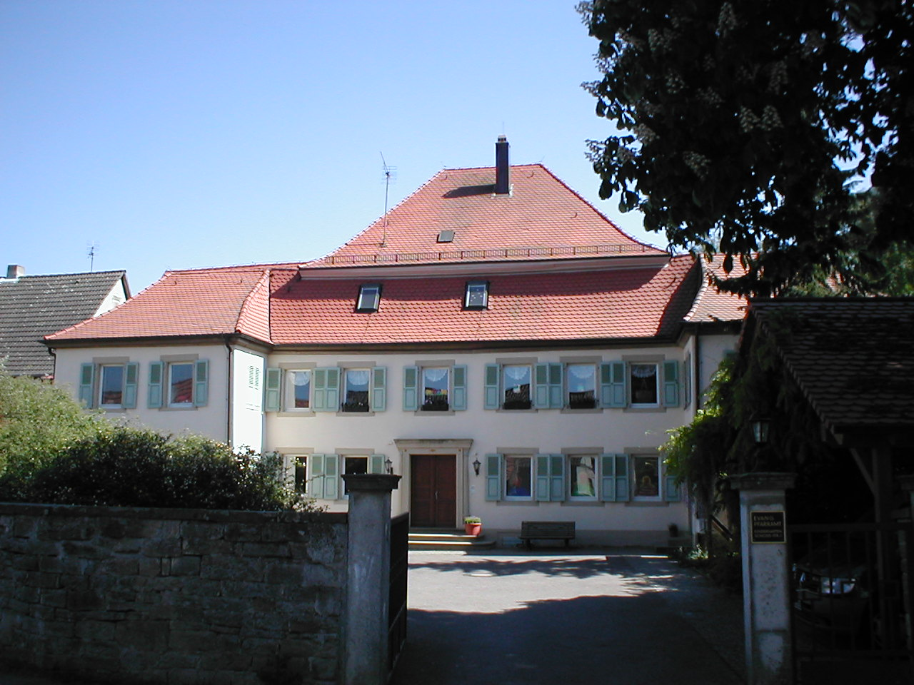 Schloss in Siegelsbach, errichtet im frühen 18. Jhd., heute Sitz der evangelischen Gemeinde.